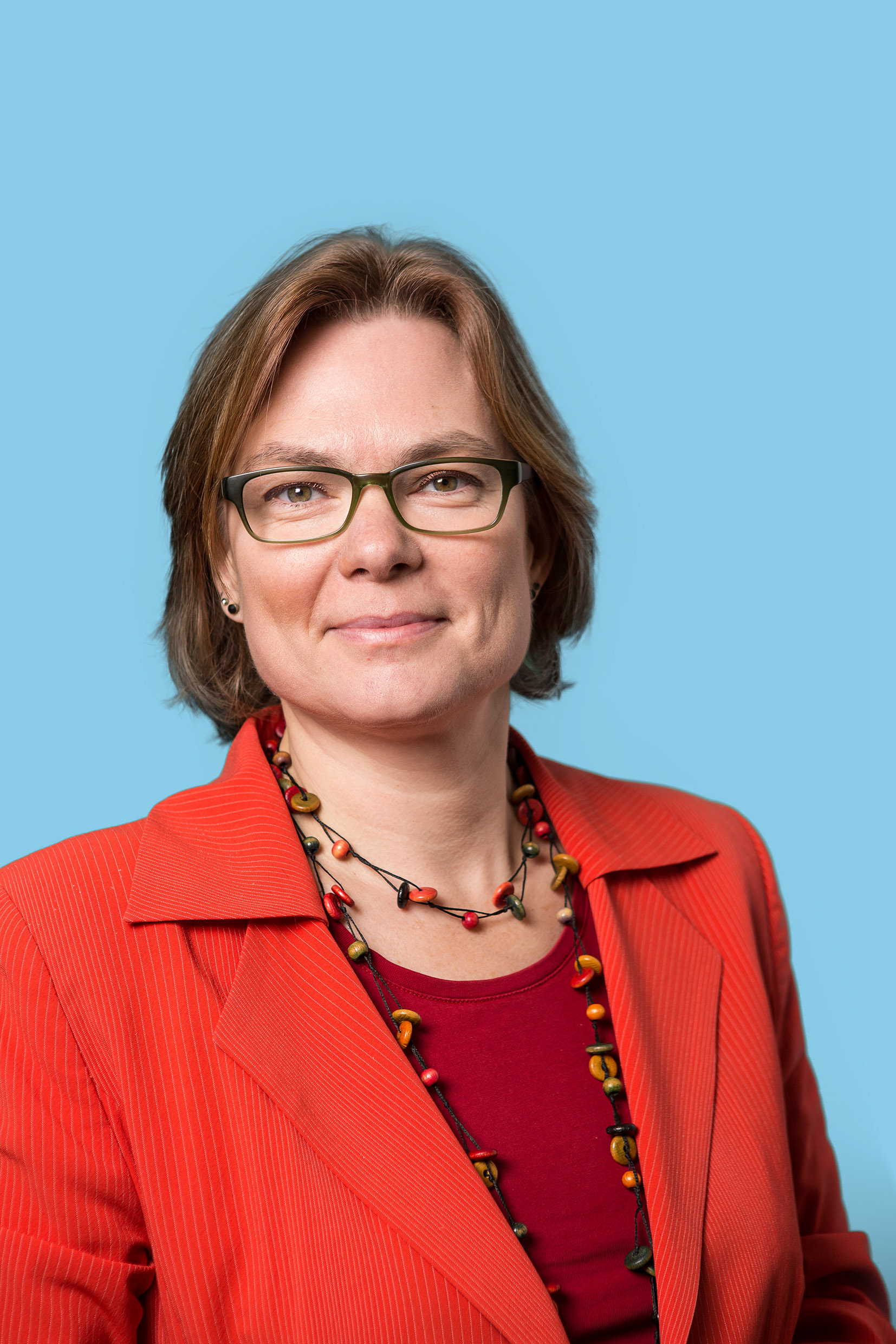 Tweede Kamerlid. Foto: Lex Draijer.